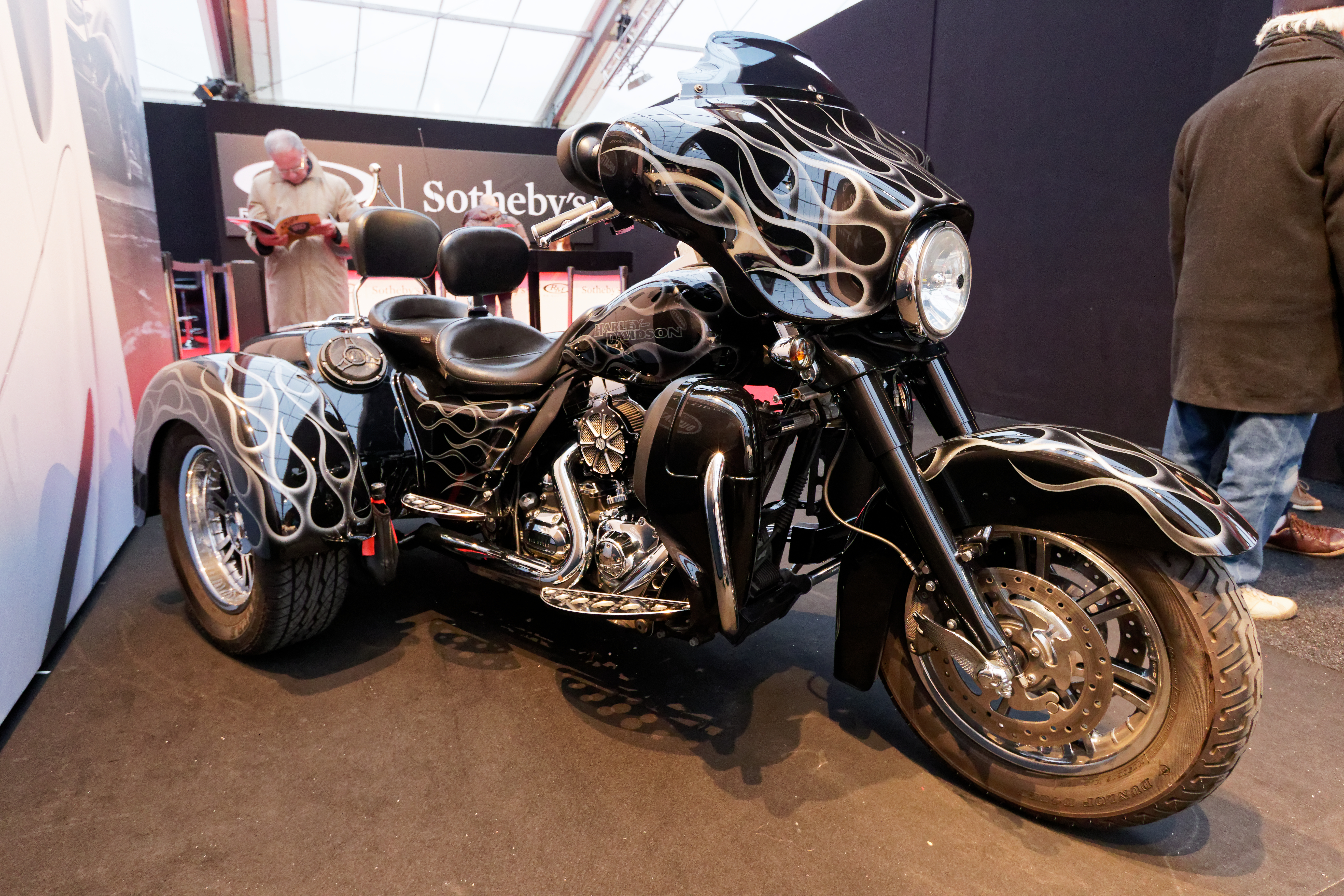 Un véhicule exposé lors de la vente RM Sotheby’s 2018 aux Invalides à Paris.